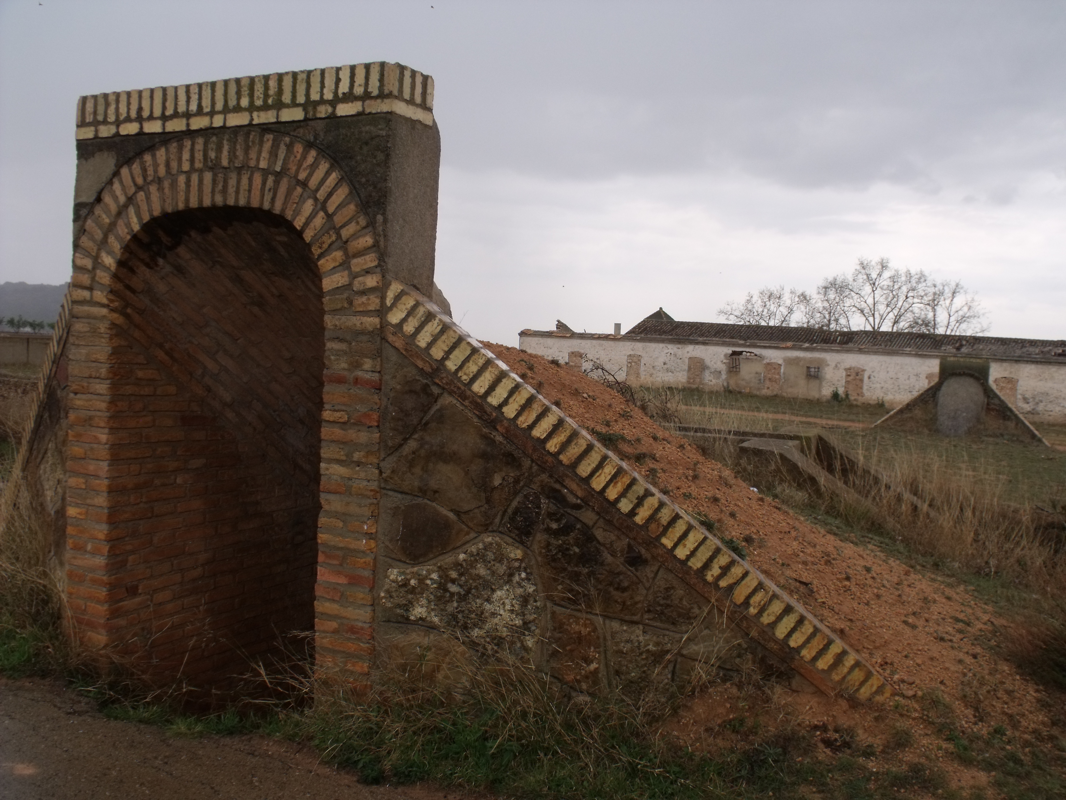 Entrada/salida al refugio del Aeródromo de Villar de la Libertad